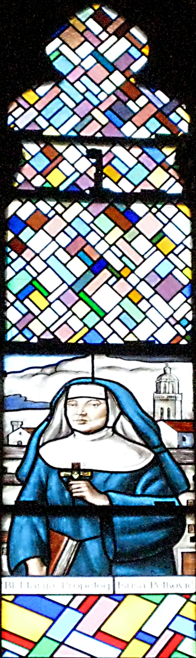 vitraj blažene Marije Propetog Isusa Petković u crkvi Gospe Lurdske, Rijeka